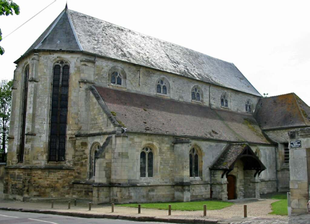 Église de Mézy-sur-Seine Photo JH Mora, avril 2005